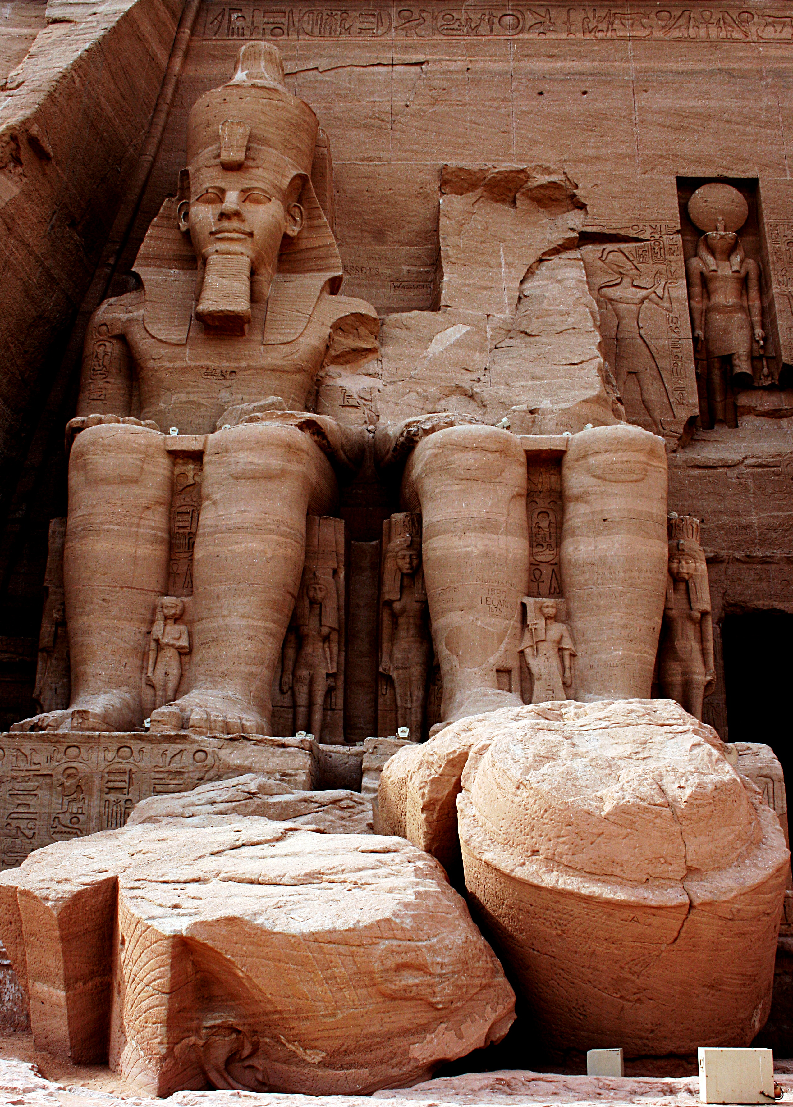 Abu_Simbel,_Großer_Tempel